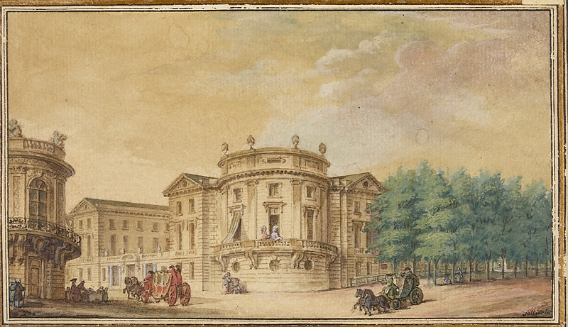 projet (non réalisé) pour l'hôtel Thellusson. Gouache sur papier